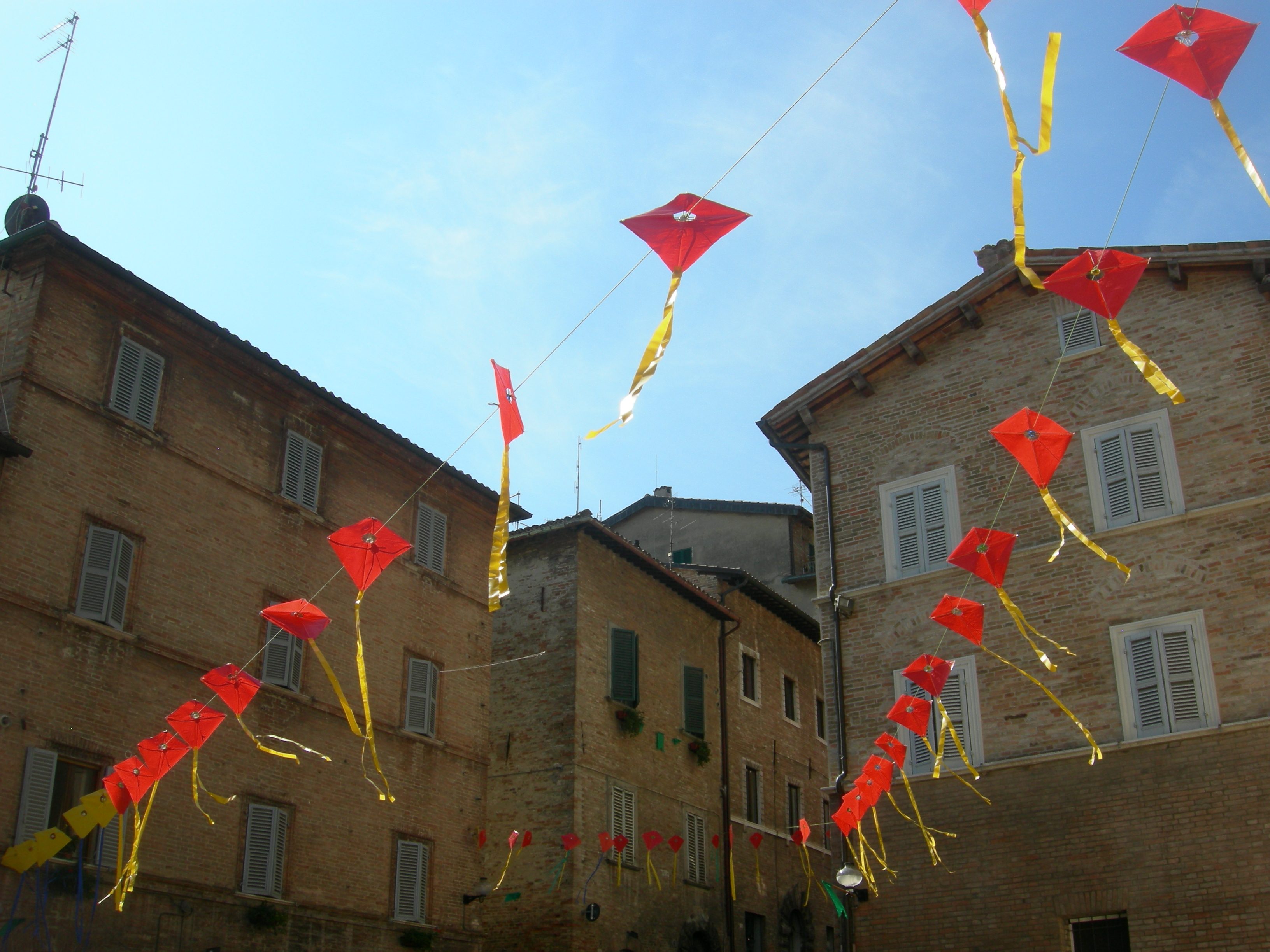 Un particolare dell'addobbo della contrada di Lavagine in Urbino, per la 53° Festa dell'Aquilone.